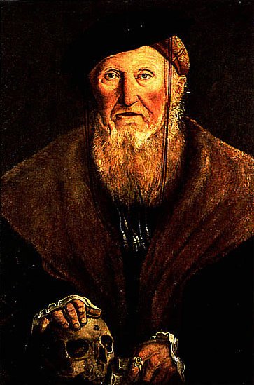 Eltet tho Lellens, de eerste burgemeester van Groningen (wisselend in de jaren 1526 tot zijn dood in 1555), waarvan een portret bestaat.